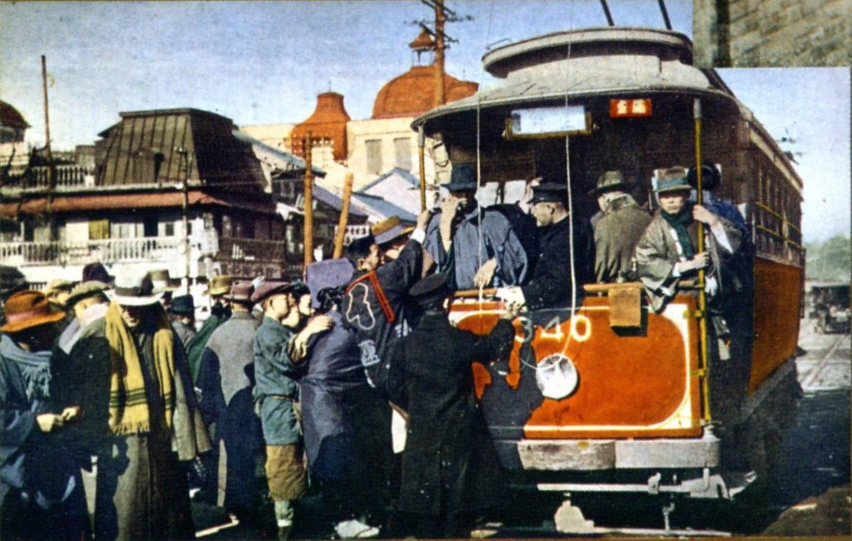 「東京名物満員電車」と題した着色絵葉書。方向幕の右に「満員」の札がぶら下がっている。写っている電車は東京市街鉄道1形を引き継ぎ1906年(明治39年)9月に東京鉄道251形、1911年(明治44年)8月に見た目は変わらず東京市電251形となったもの。 白土貞夫「絵葉書でつづる中央線今昔ものがたり」(2011年5月25日、エイ出版社)にも掲載されている。